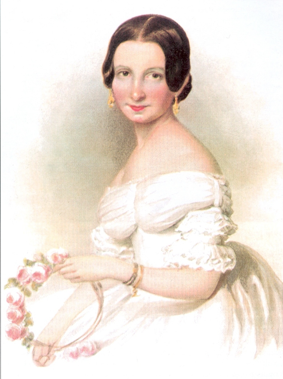 Sissányi Elíz, Erzsébet, Leiningen-Westerburg Károlyné